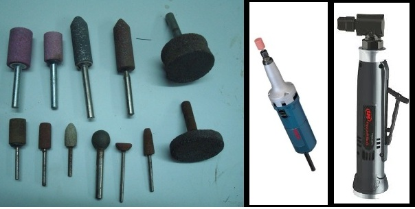 Meuleuses portatives pneumatique et assortiment de meules